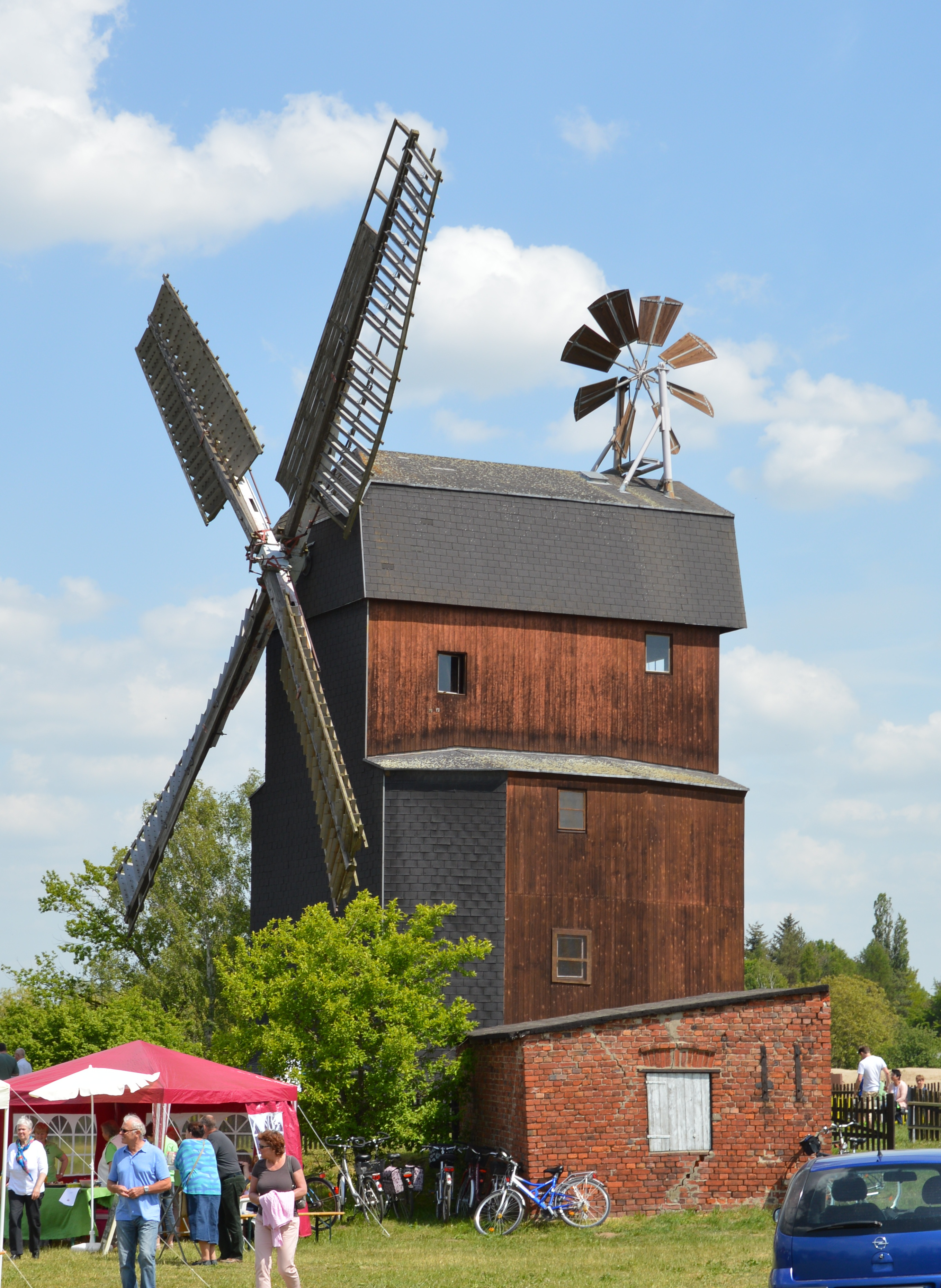 Windmühle in Parey